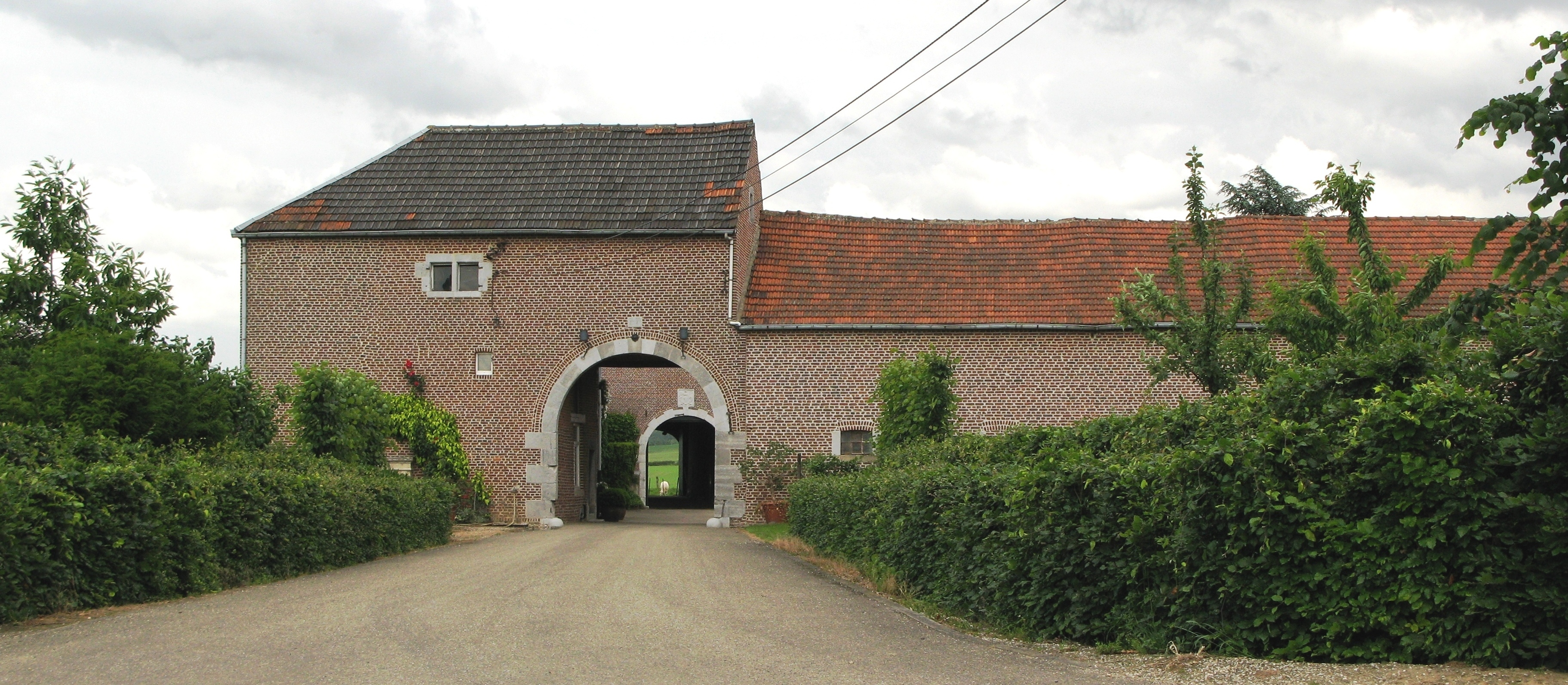 D'Westpaart vun der Moinerie au sdem Joer 1721. Kategorie:Provënz Léck